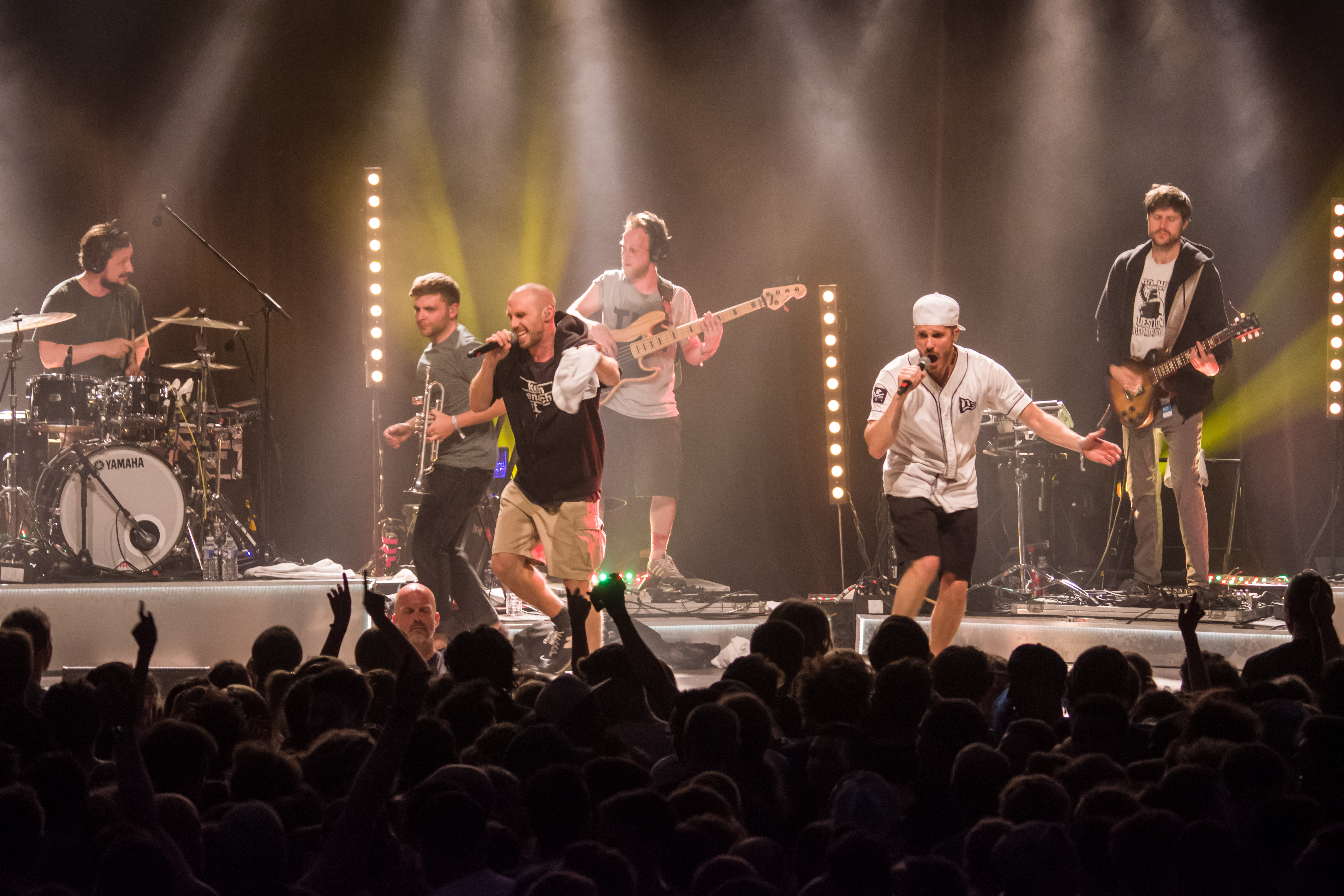 Das Zelt-Musik-Festival 2017 in Freiburg im Breisgau 15.07.2017 Irie Révolté